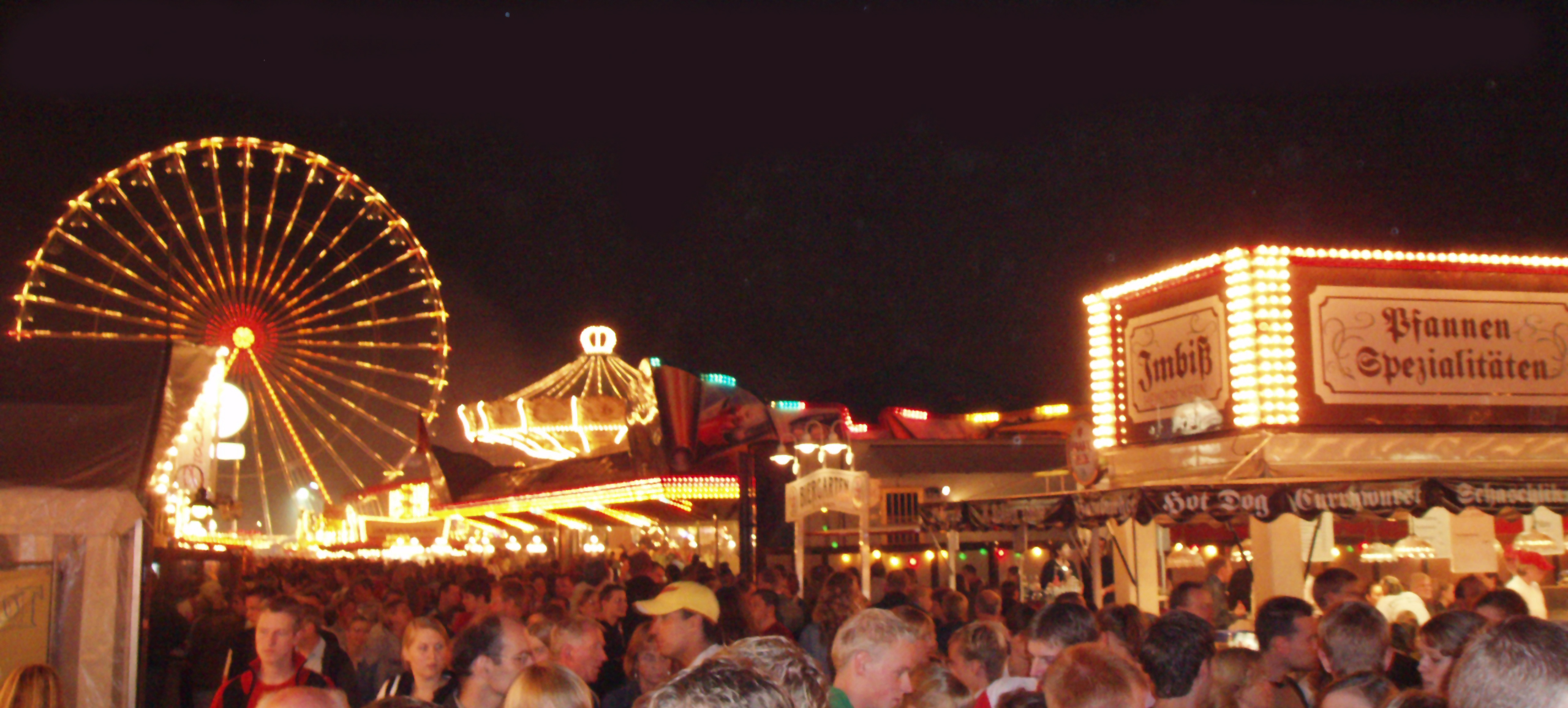 Der Stoppelmarkt in Vechta am Abend